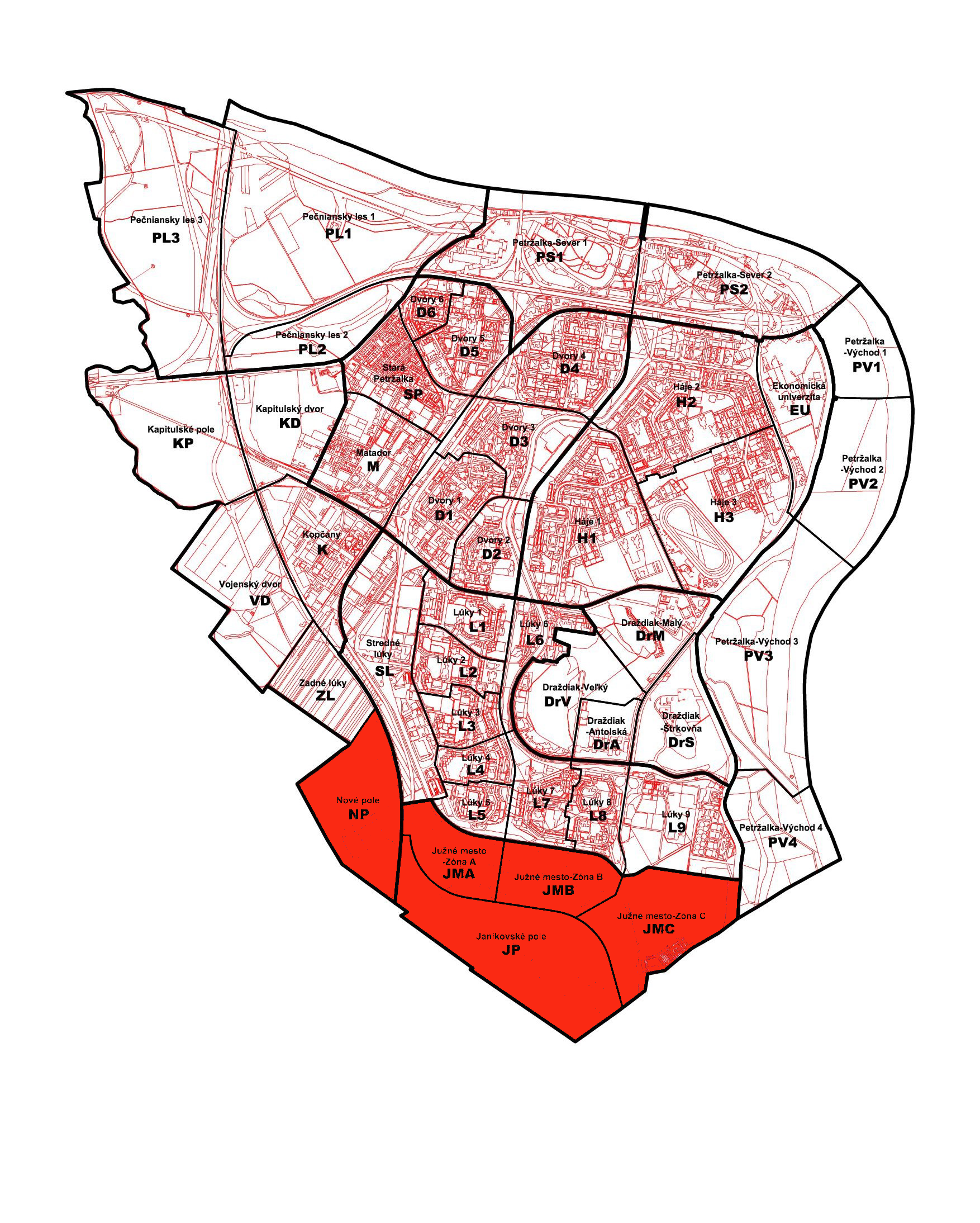 Poloha miestnej časti Petržalky